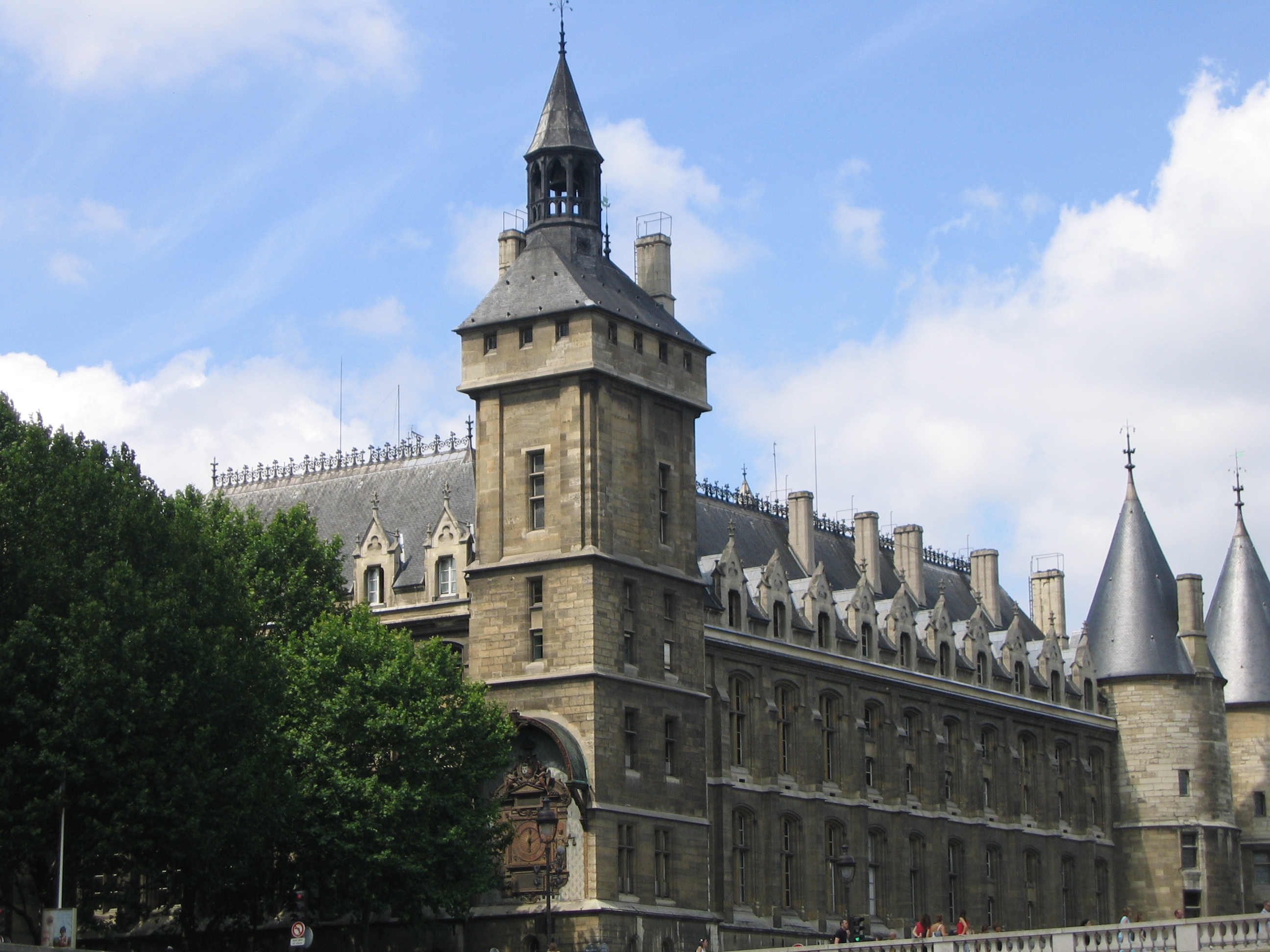 Tour de l'Horloge du Palais de la Cité, à Paris.